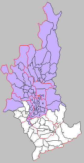 京都府紀伊郡の町村制時点の町村。